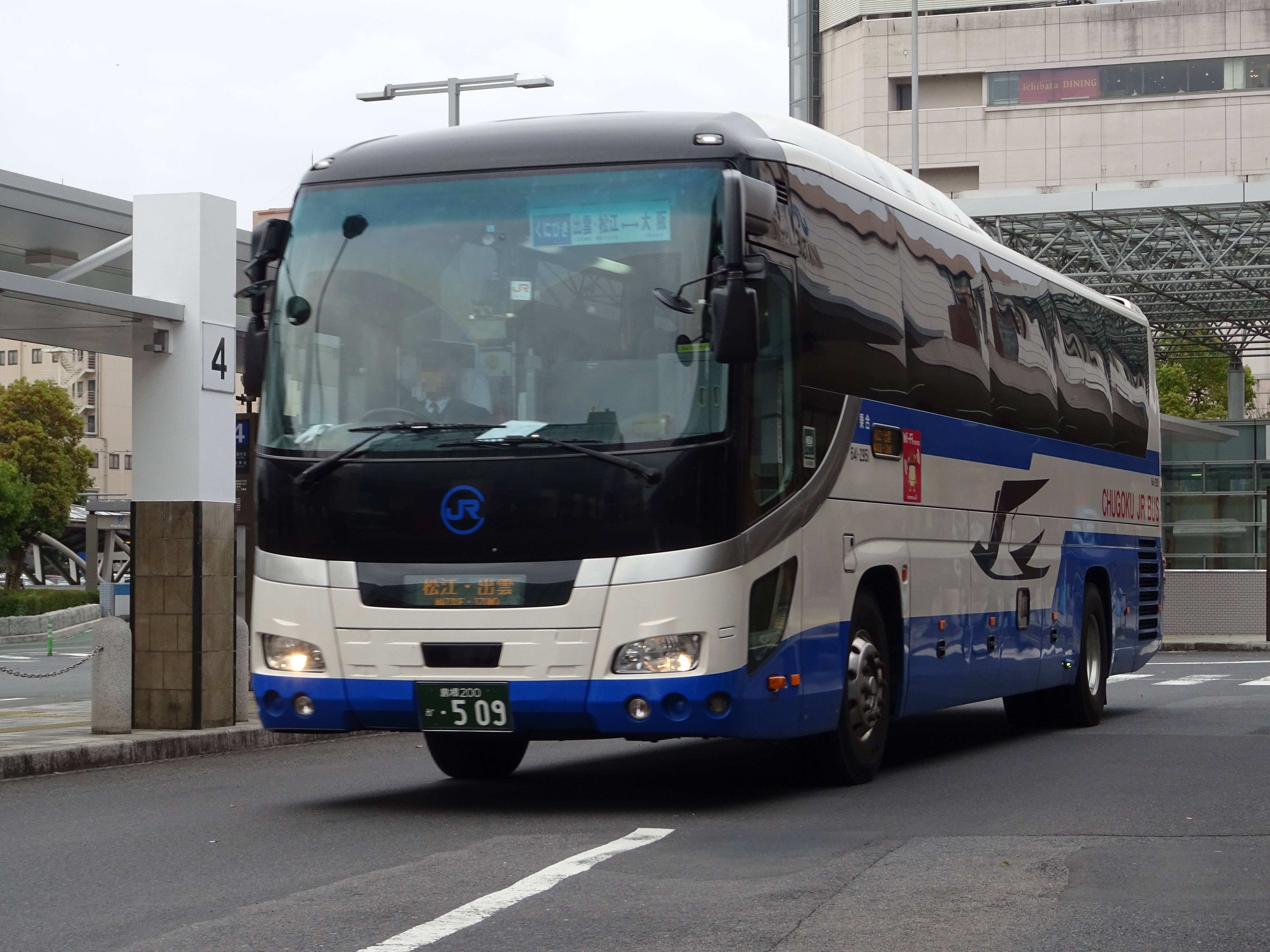 中国ジェイアールバス 641-2951 島根 200 か ･509